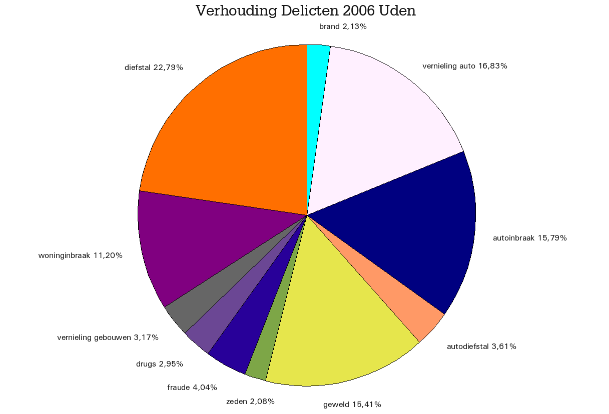 Criminaliteitcijfers Uden verhouding delicten (2006), Noord-Brabant, The Netherlands